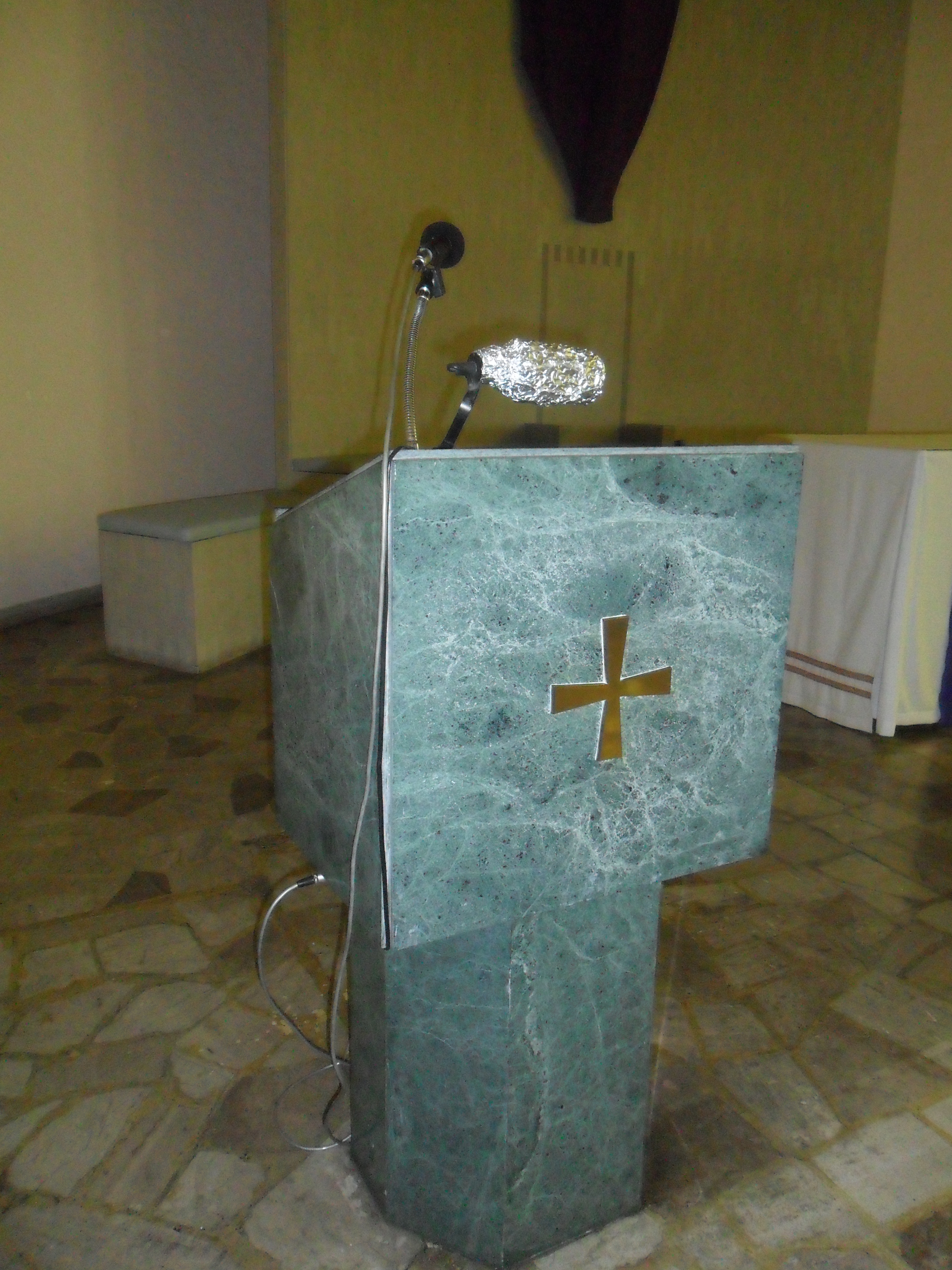 中文（香港）: 聖老楞佐堂, 香港, 中國